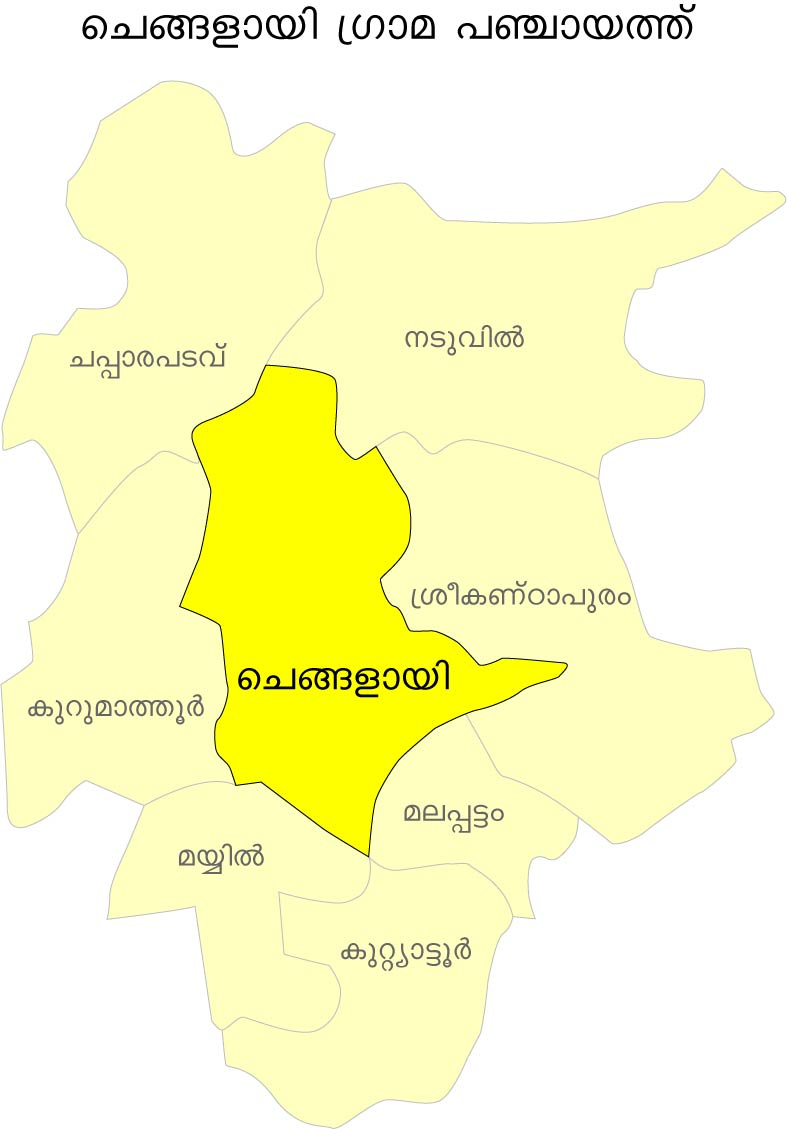 കേരളത്തിലെ കണ്ണൂർ ജില്ലയിലെ തളിപ്പറമ്പ് താലൂക്കിലുള്ള ഒരു ഗ്രാമമാണ് ചെങ്ങളായി.